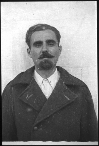 Fridolin Karl Puhr (* 30. April 1913 in Groß Gaungs; † unbekannt) war SS-Hauptsturmführer und als Truppenarzt im KZ Dachau eingesetzt. Im Dachau-Hauptprozess wurde Puhr zum Tode verurteilt, das Urteil später jedoch in 20 Jahre haft umgewandelt.